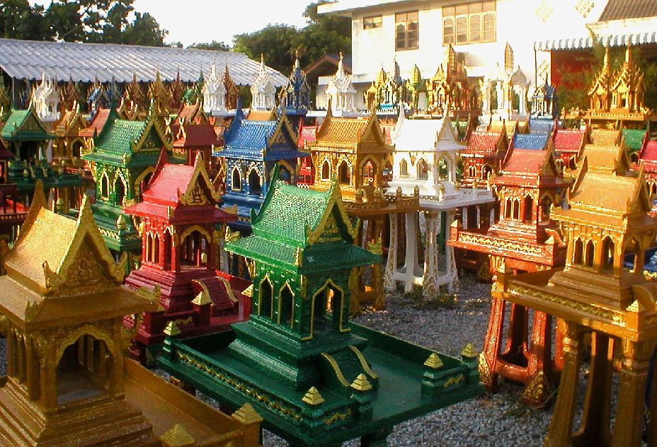 Un fabricant de Maison des esprits (Thaïlande) Exposition de "Maison des esprits" modernes fabriquées en série. Prise de vue personnelle. Pattaya (Thaïlande) Novembre 2004 Utilisateur:Siren